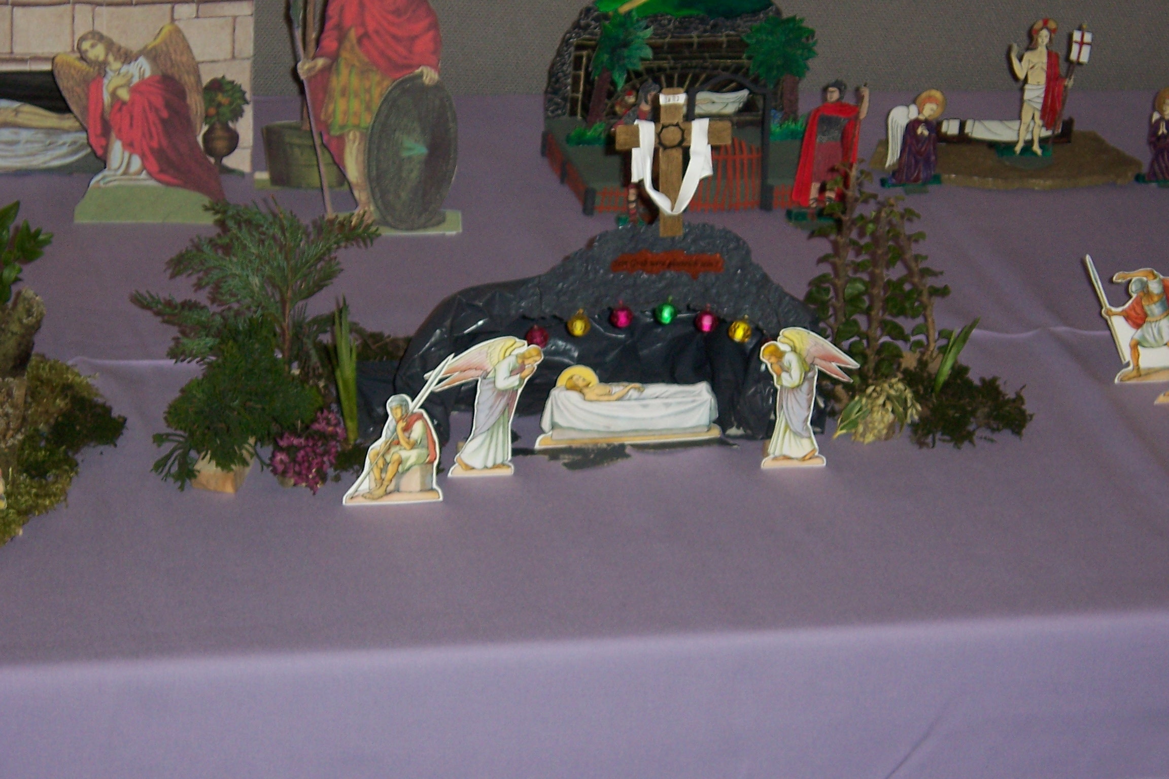 Miniatur-Heilige-Gräber/Fastenkrippen auf einer Osterausstellung 2011.